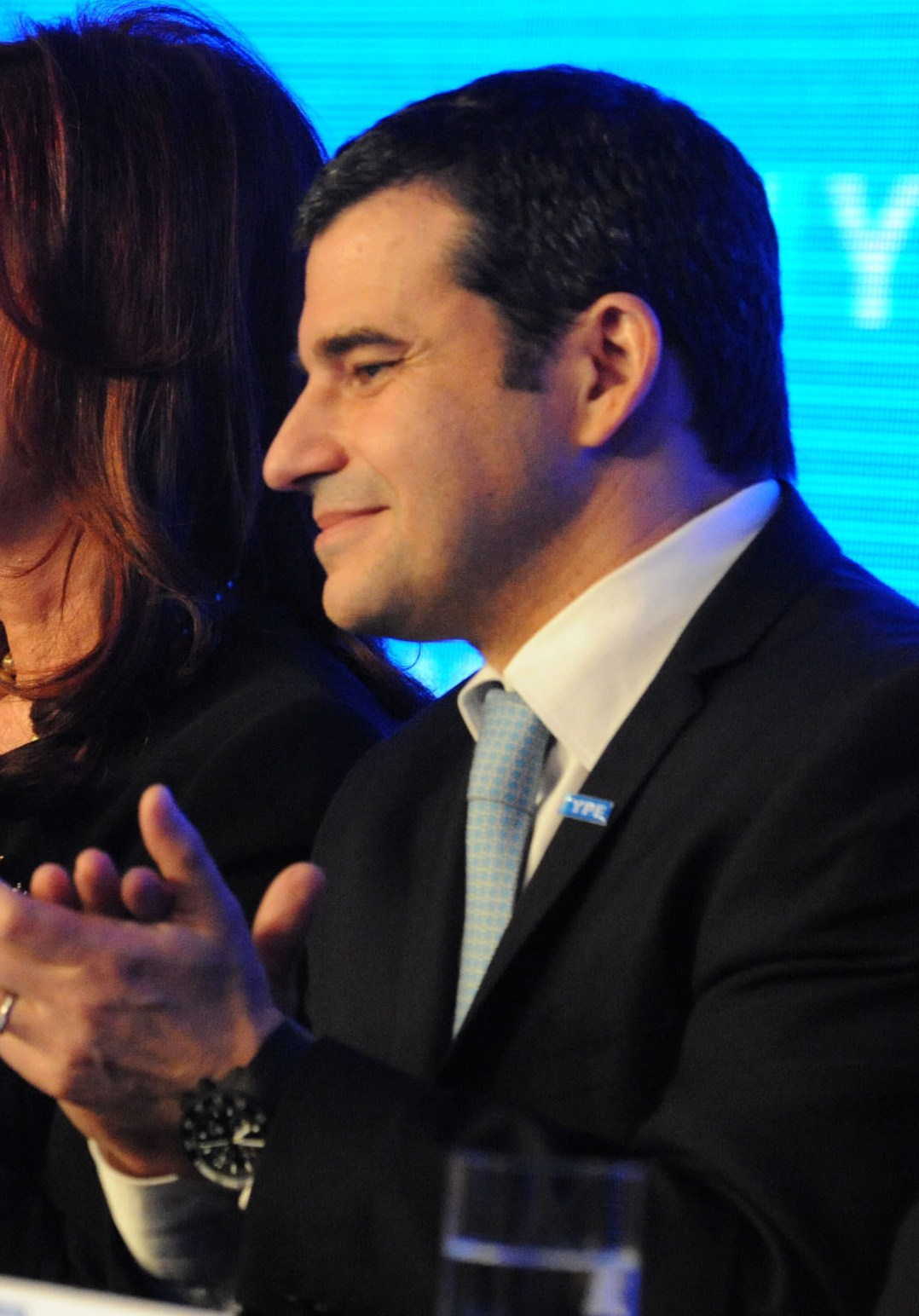 CEO de la companía YPF Miguel Galluccio